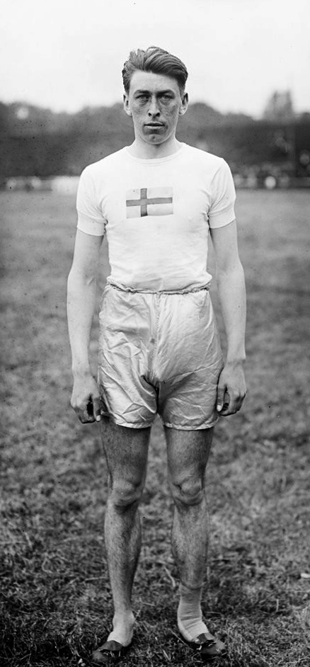 28-8-16 [i.e. 28-8-20], Colombes, [Göran] Hultin (suédois) [2e du] 110 m haies : [photographie de presse] / [Agence Rol]